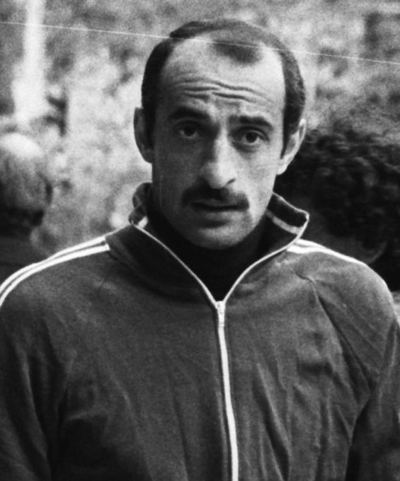 Morgen speelt Feyenoord tegen Dynamo Tiflis om de Europacup-II, de top van Dynamo Tiflis v.l.n.r. Chivadz Gutzaev en Kipiani